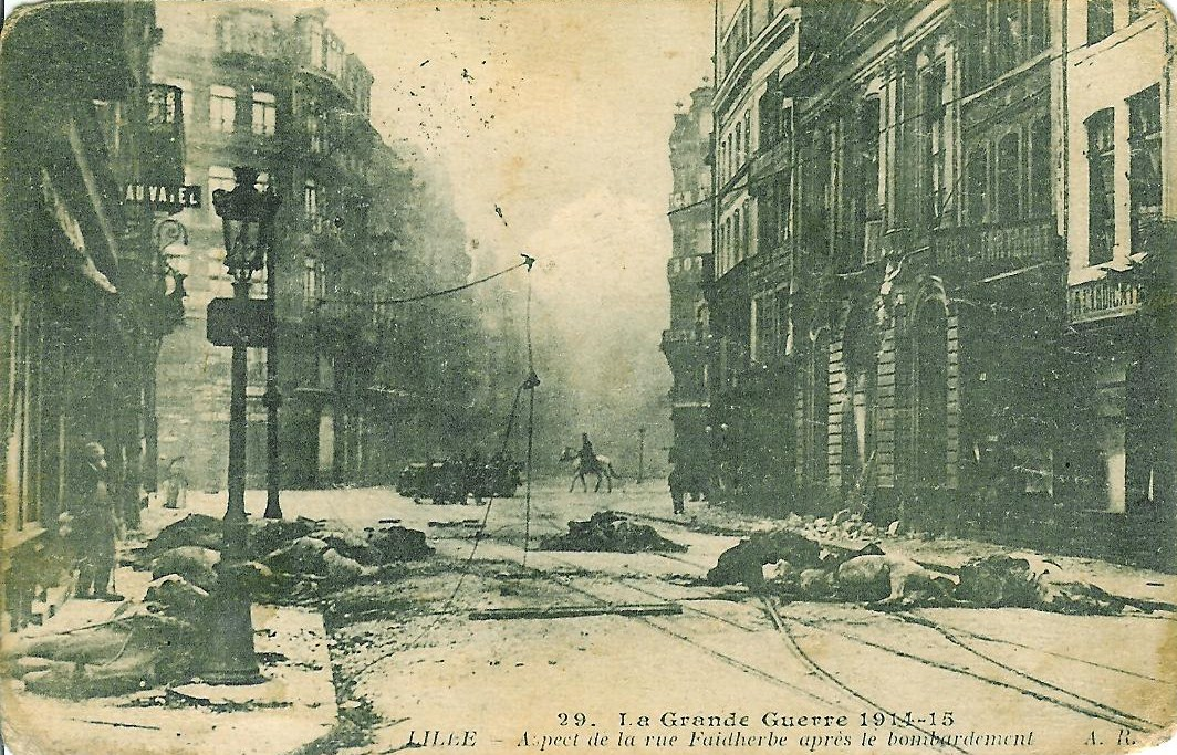 "La Grande Guerre, Lille — Aspect de la rue des Ponts de Comines et de la rue Faidherbe après le bombardement 1914-15". L'intitulé de la carte postale est en partie erroné : La rue Faidherbe* est visible à gauche en direction de la gare et un peu moins à droite de la photo en direction de la place du Théâtre. La photo a été prise dans la rue des Ponts de Comines qui se prolonge plus loin après le croisement. Nous sommes ici devant une scène se déroulant en 1914. On peut apercevoir, le Grand Hôtel, 22-24 rue Faidherbe, à l'angle de droite au fond et caché par le rang d'immeubles ; Édifice reconstruit après la Grande Guerre, actuel Monoprix. *→ 2 La Grande Guerre 1914-15. Lille — Aspect de la rue Faidherbe après le bombardement v°-r°